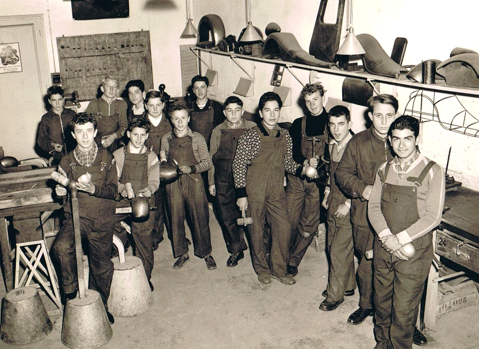 Atelier de la Section carrosserie au centre d'apprentissage Georges Lamarque à Nice (Alpes Maritimes) France